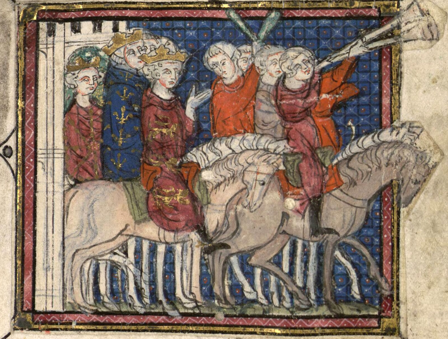 Filip IV. Sličný, Eduard II. Anglický a Ludvík Navarrský (1313)